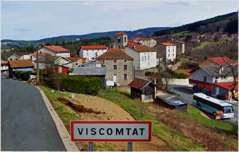 entrée du bourg par le haut